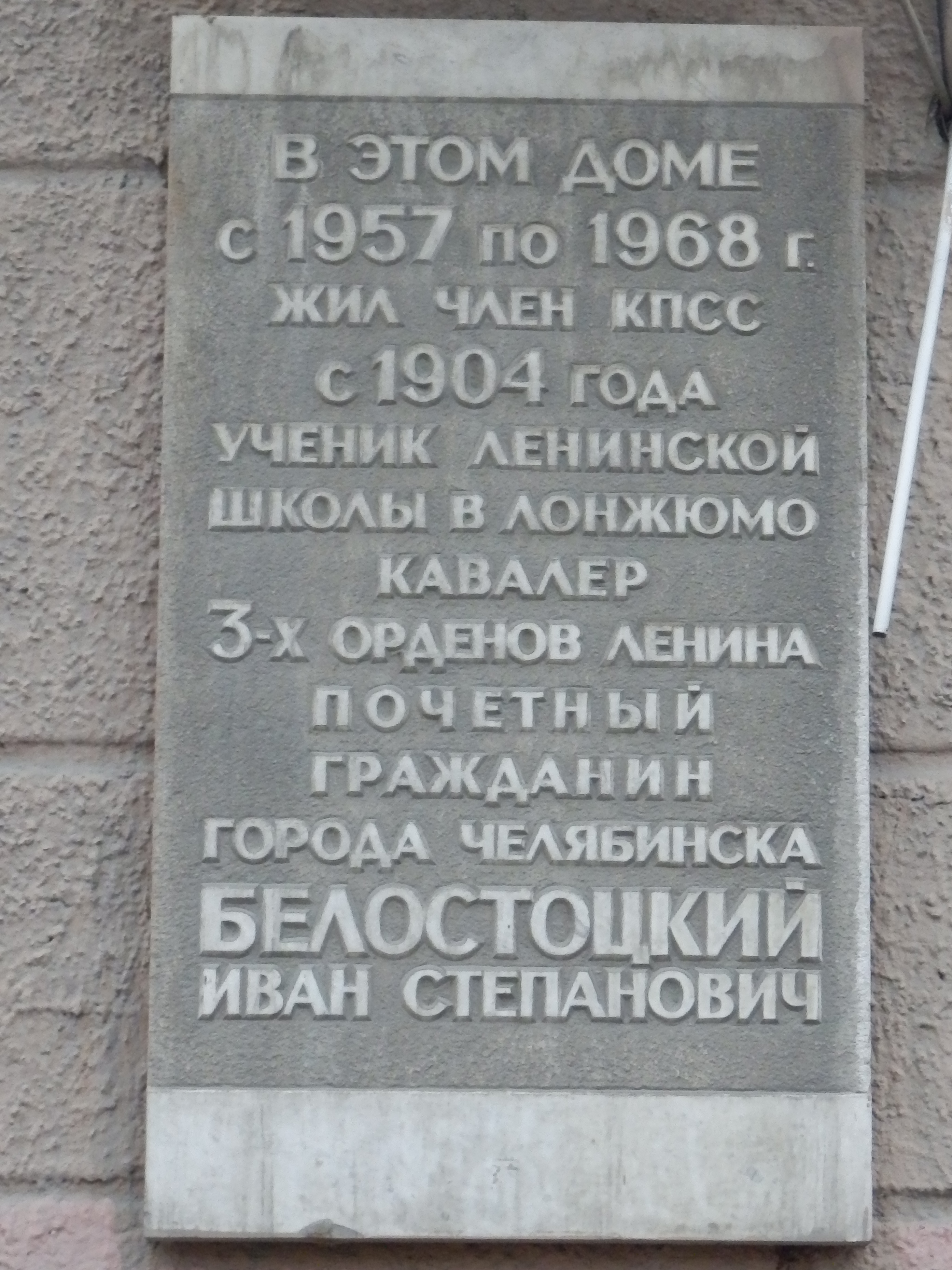 Мемориальная доска кавалеру трёх орденов Ленина Белостоцкому Ивану Степановичу на здании, где он прожил с 1957 по 1968 годы по адресу: г.Челябинск, ул. Свободы, 66. Крупный план.